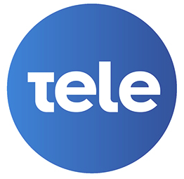 Nuevo logo de Teledoce, versión coloreada en azul.